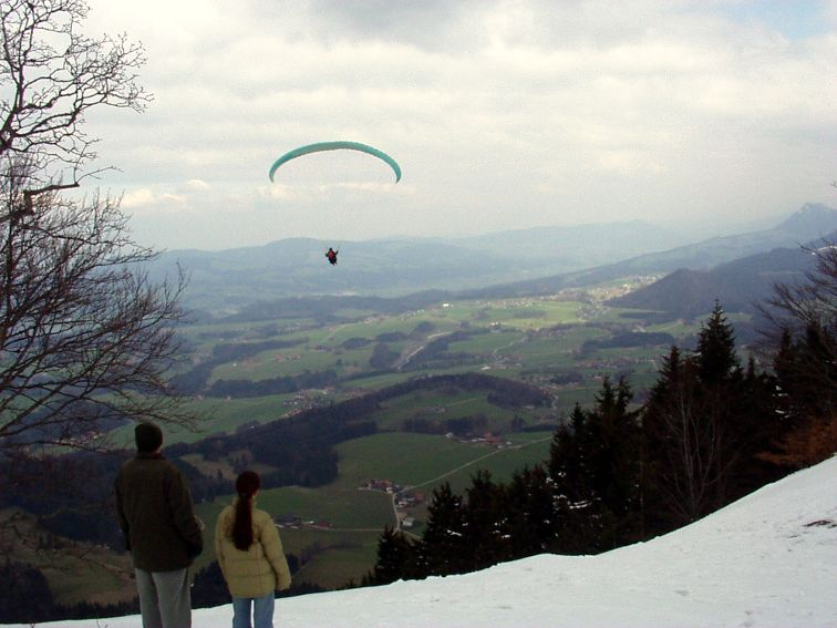 Paragliding at Gaisberg, Austria